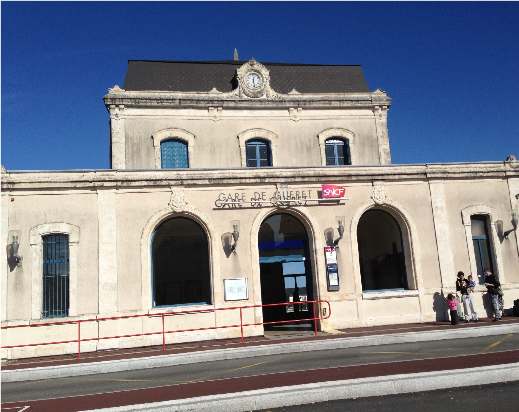 Gare de Guéret-2014